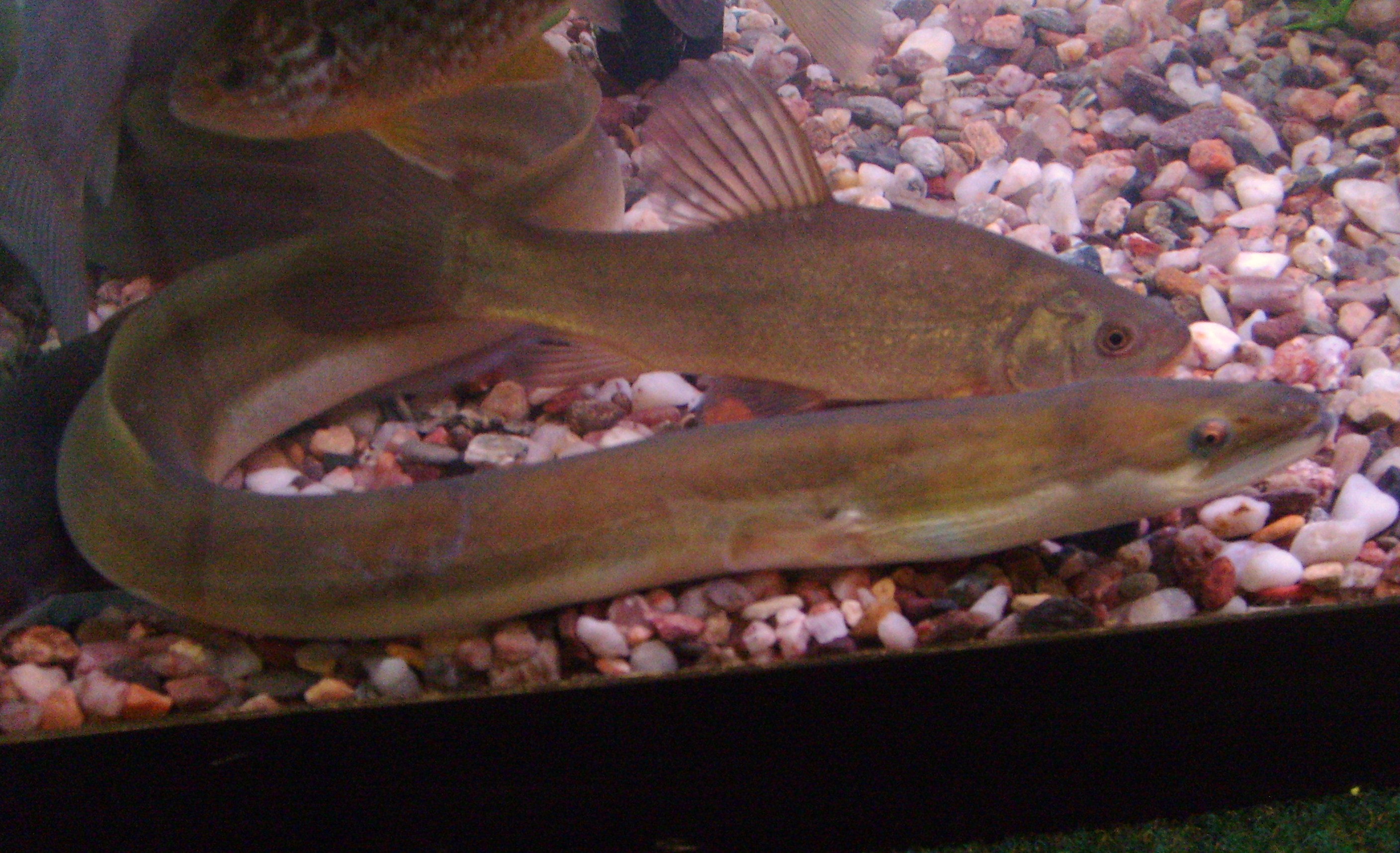 Úhoř říční v akváriu na veletrhu Petrův zdar.